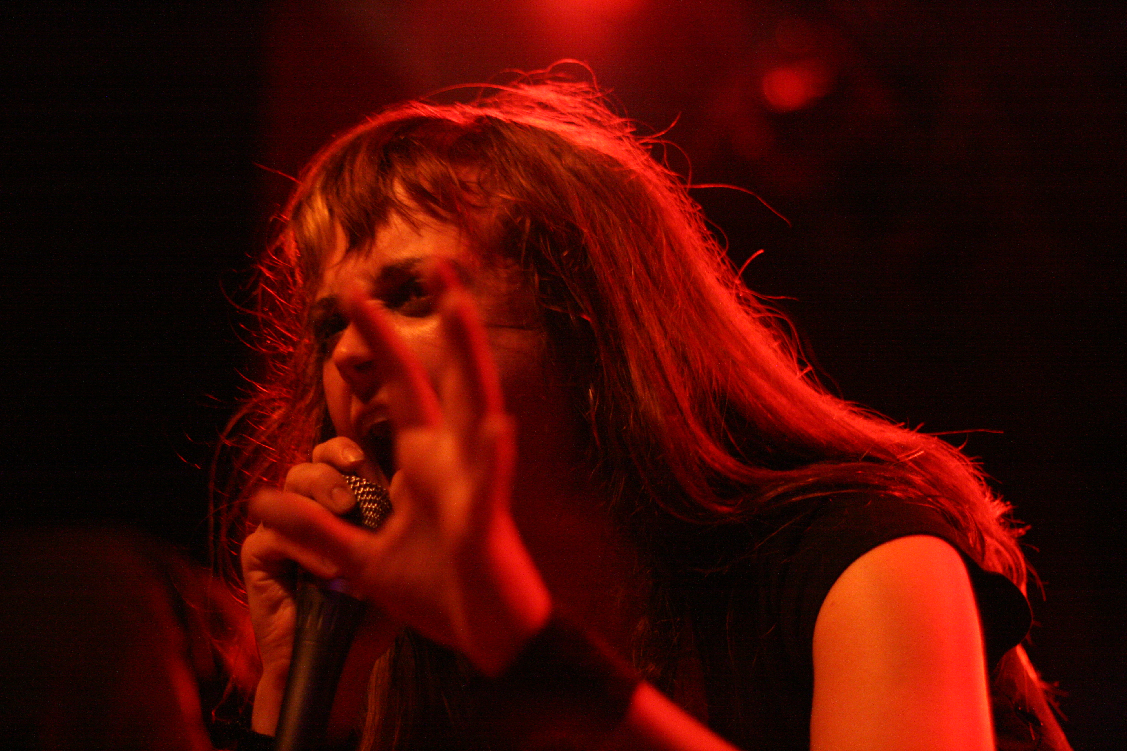 brooklyn vegan party brooklyn vegan party